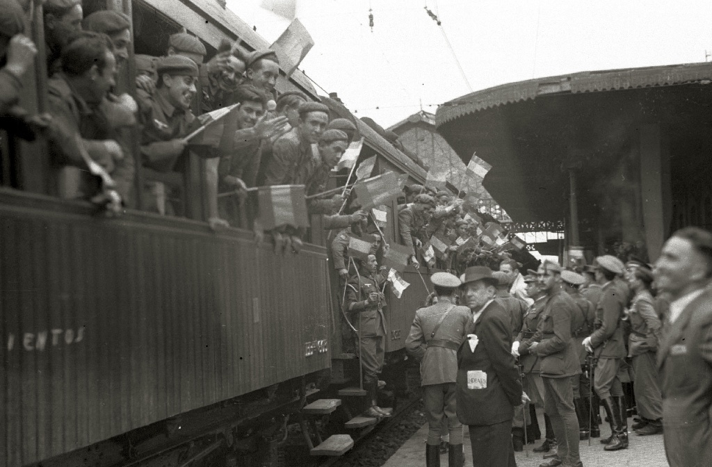 Título original: Llegada de integrantes de la División Azul a la estación del Norte (3/40) Localización: San Sebastián (Guipúzcoa)